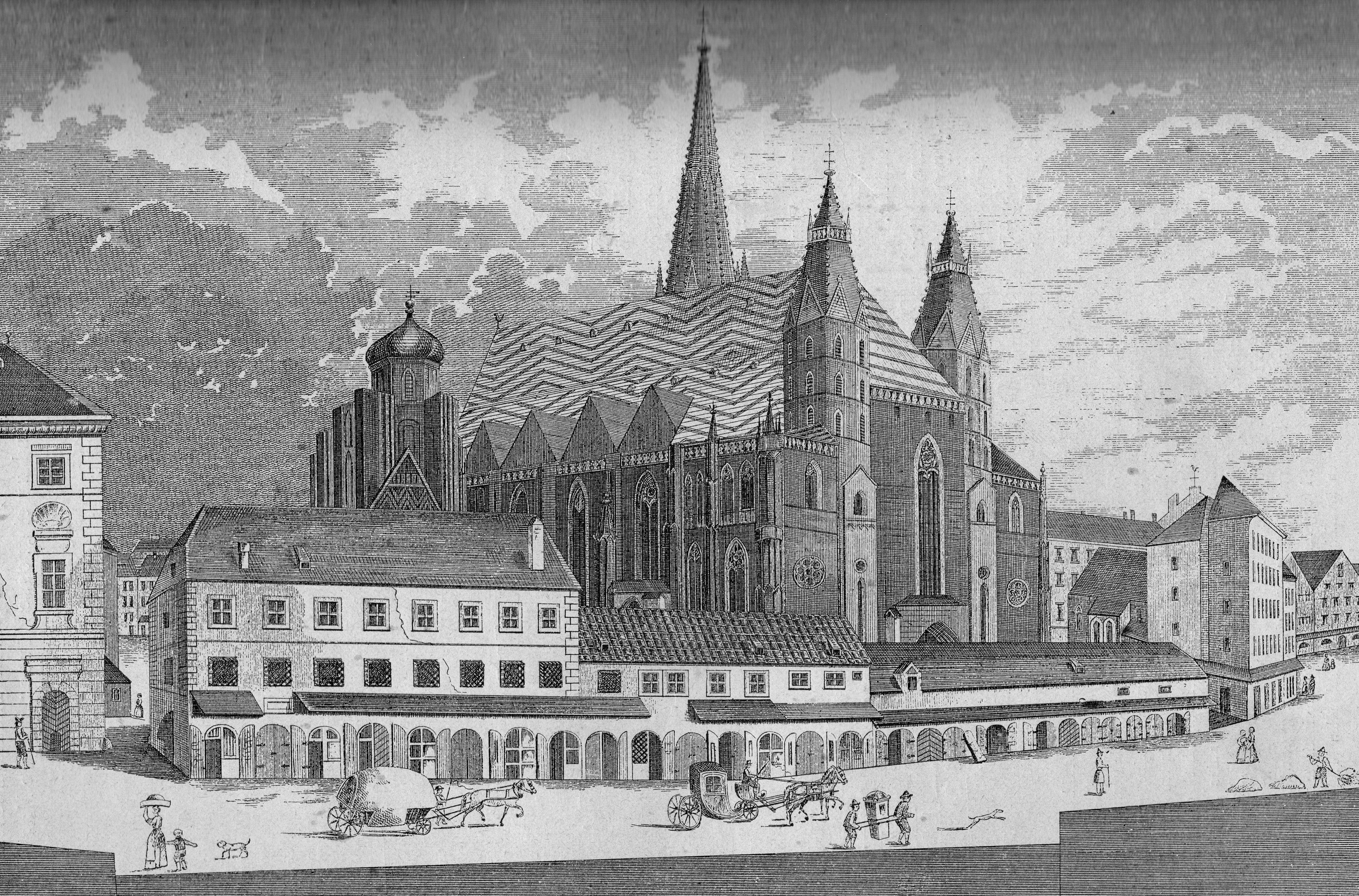 Das Leihbahr- Messner- und Cantorhaus am Stephansplatz in Wien um 1780, im Hintergrund der Stephansdom